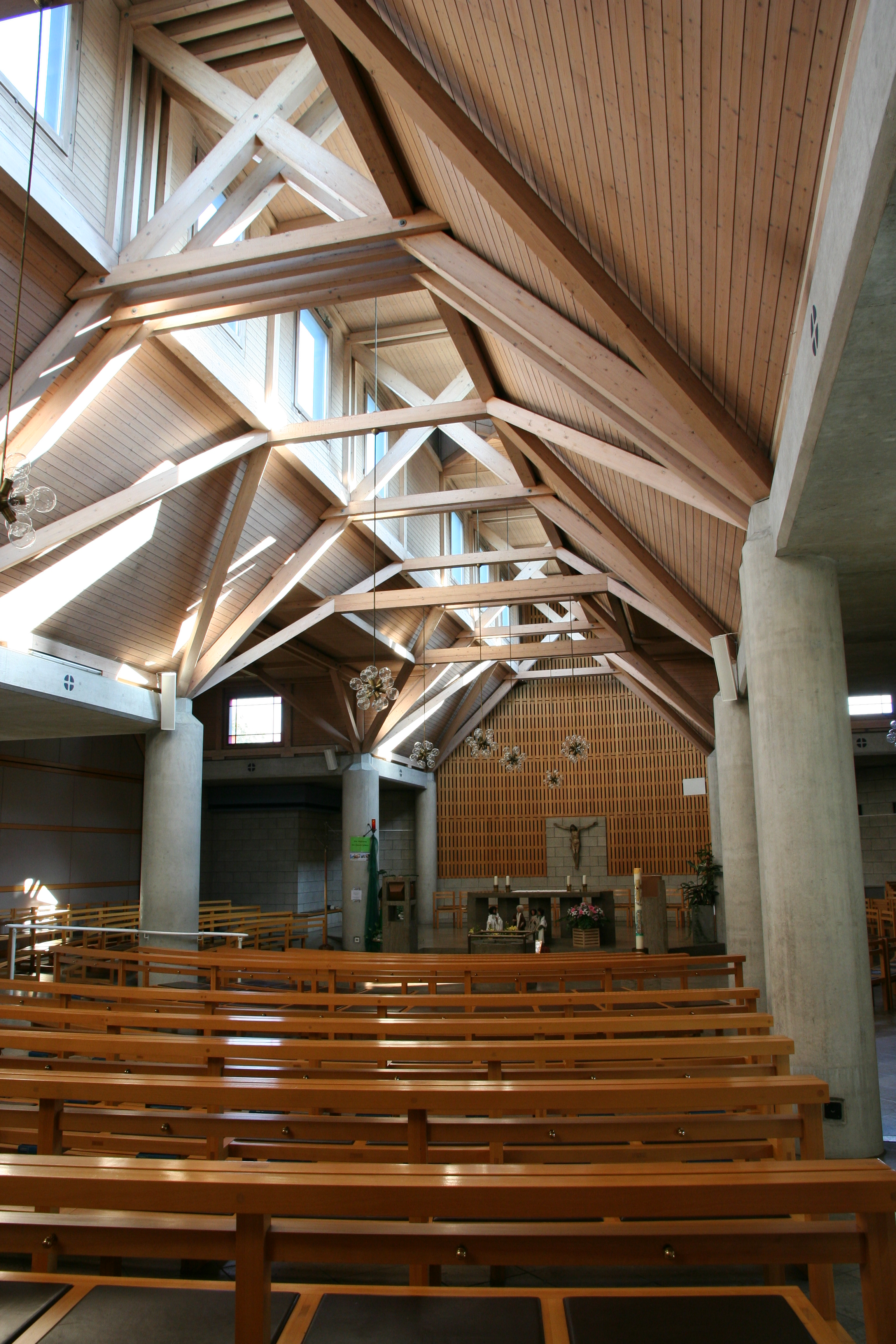 Römisch-katholische Pfarrkirche St. Josef Affoltern am Albis, Innenansicht